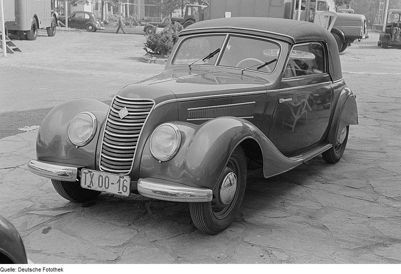 Original image description from the Deutsche Fotothek PKW der IFA auf der Leipziger Herbstmesse 1954